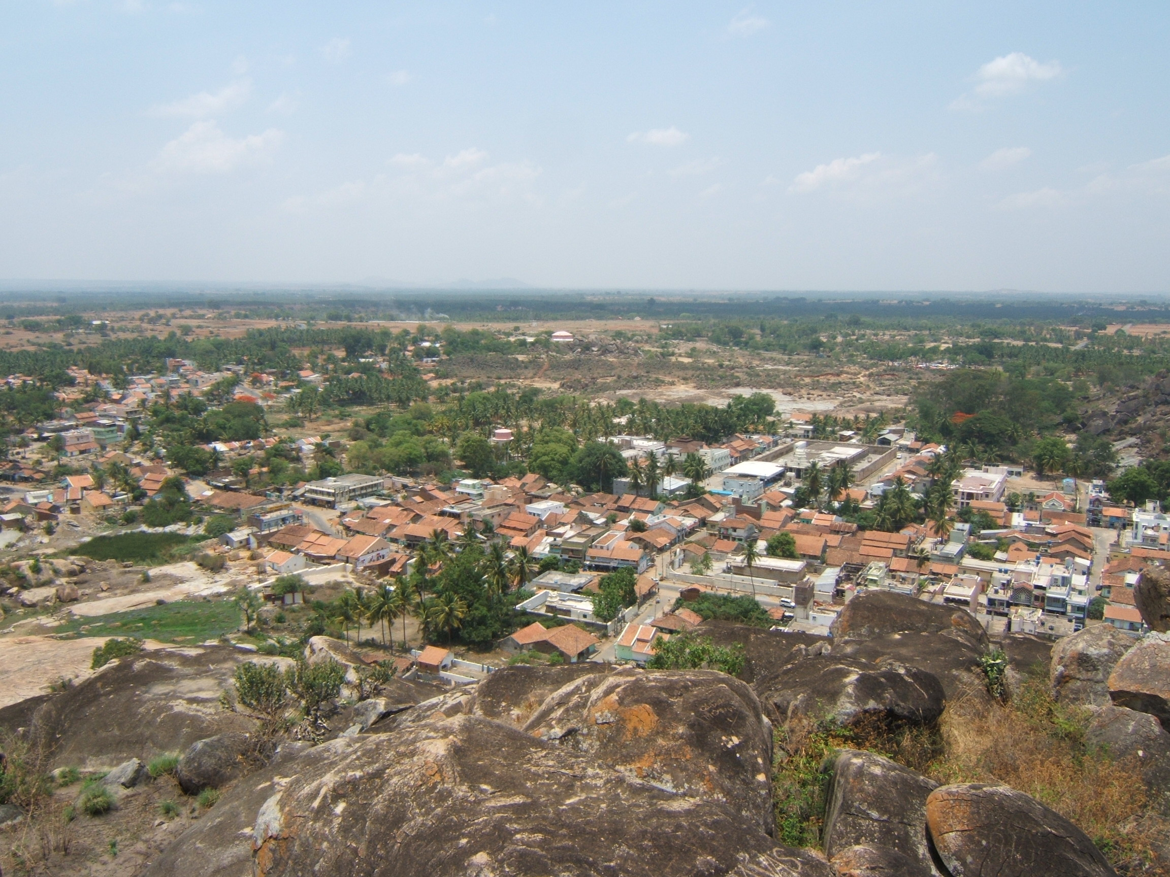 Shravanabelagola, Karnataka, India